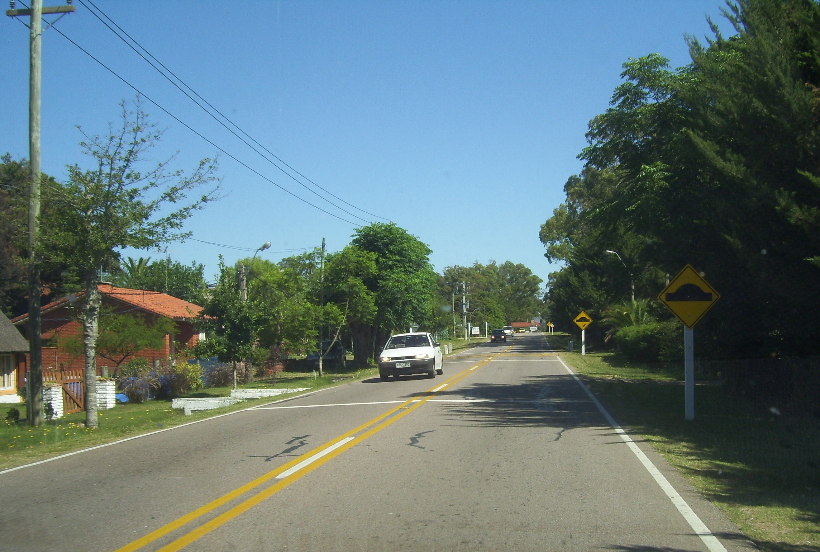 Calle Principal del balneario Solís